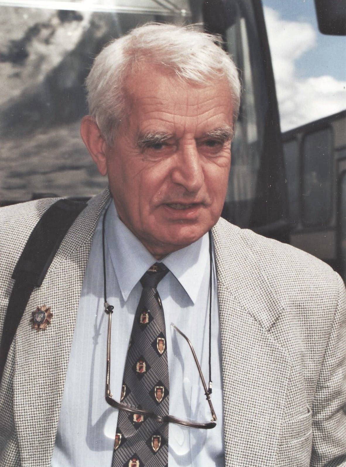 Михаил Абрамович Трейстер — председатель Белорусского общественного объединения евреев — бывших узников гетто и нацистских концлагерей (БООУГК), вице-президент Международного союза евреев — бывших узников фашизма. Фотография 2005 года, Хельсинки, Финляндия.